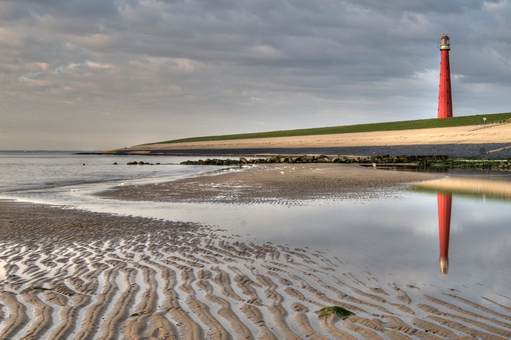 plaats: Huisduinen Status: actief Start bouw1877 Opening: 1 april 1878 Architect: Quirinus Harder Monument, sinds 1988 Karakter: groepschitterlicht, 4 schitteringen per 20 seconden Bouwwerk Hoogte: 63,45 m Vorm: zestienzijdig Bouwmateriaal: gietijzer Uitrusting Lichtsterkte: 2.500.000 cd Reikwijdte: 30 zeemijl Radar: ja Bemand: nee